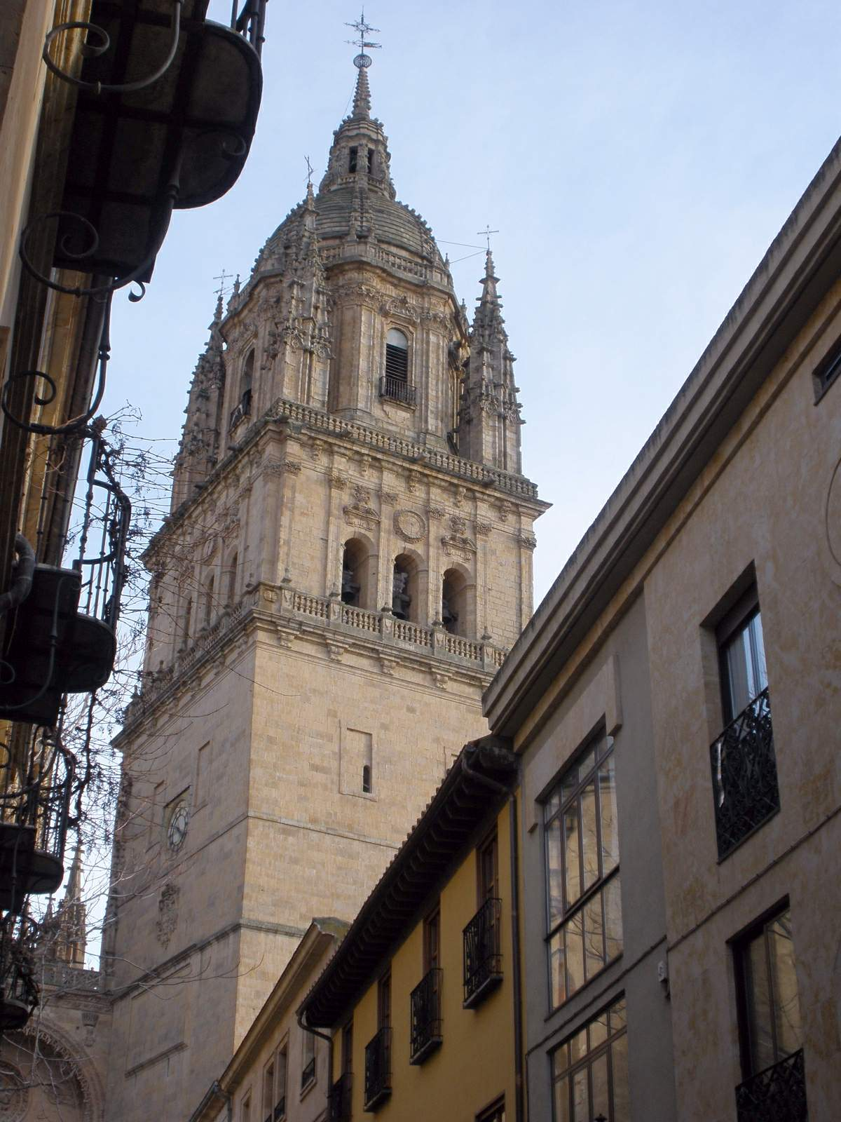 Catedral Nueva de Salamanca